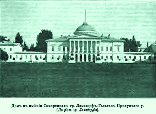 Будинок у маєтку графа Ламздорфа-Галагана. Село Сокиринці Прилуцького повіту. House in the estate of Count Lamsdorf-Galagan. Village Sokyryntsi, povit of Pryluky Maison dans le domaine du comte Lamsdorf-Galagan. Village Sokyryntsi, povit de Prylouky